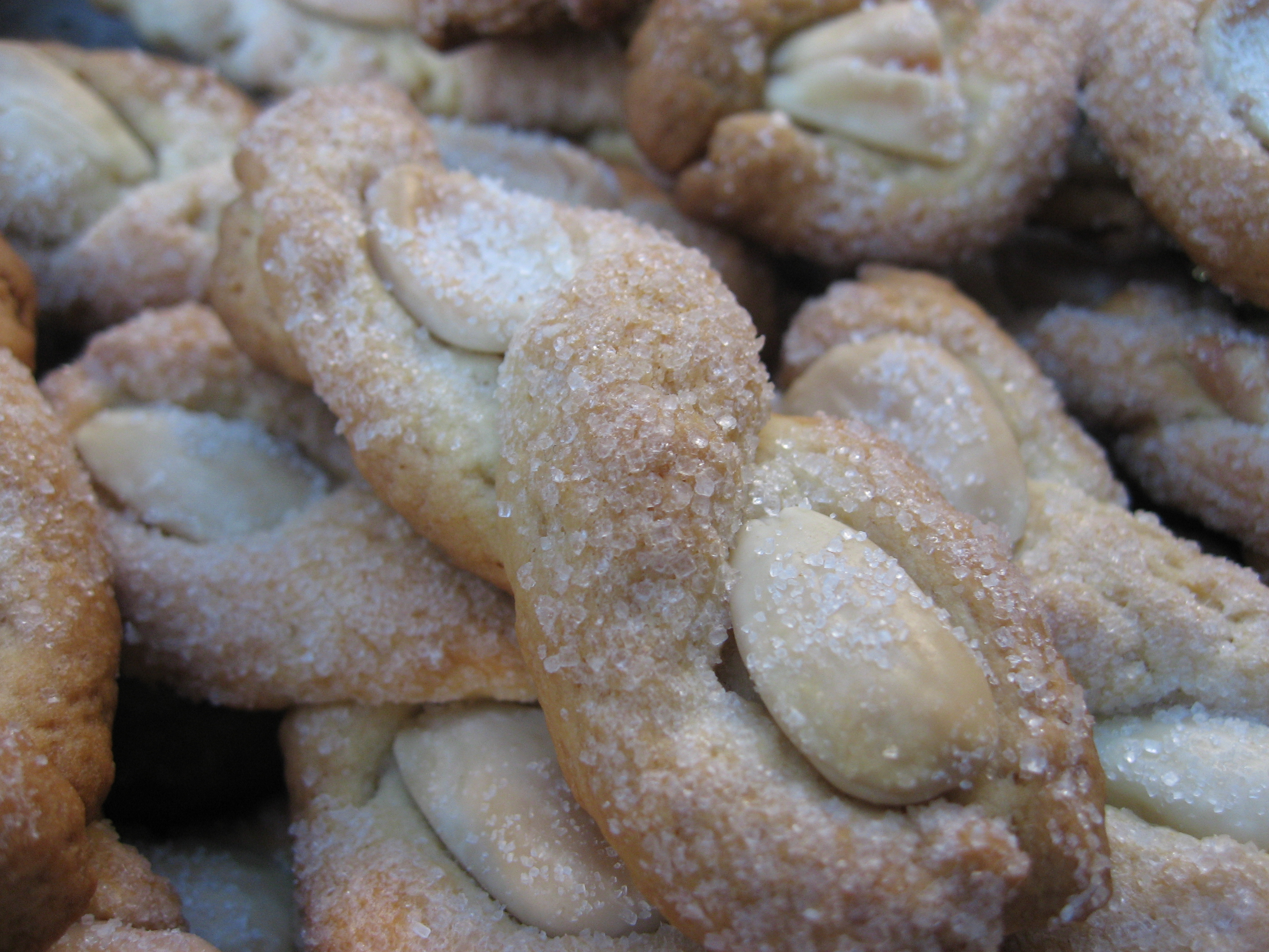 biscotti